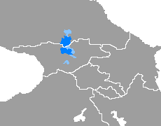 Donde es mayoritario Donde es minoritario